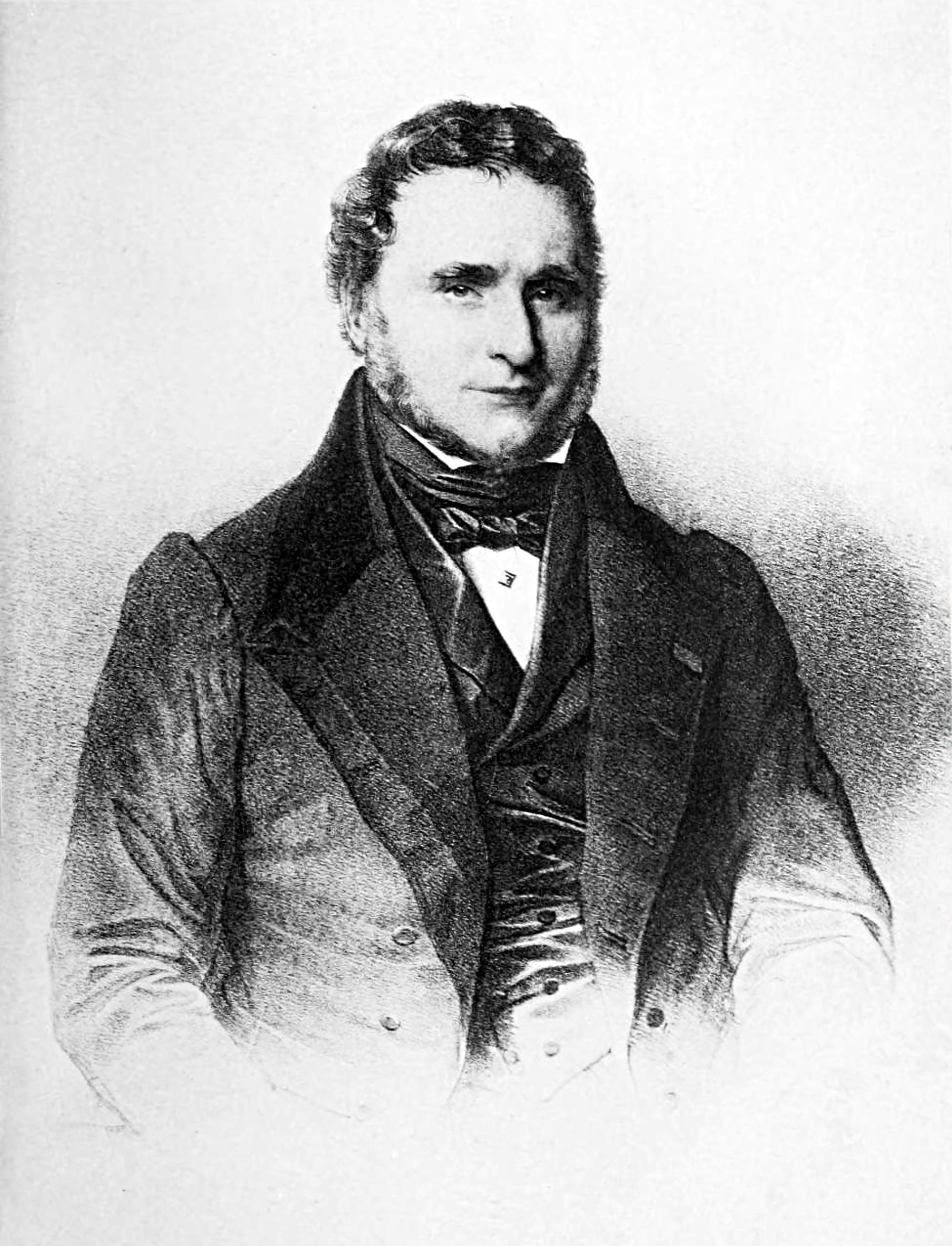 Alexandre_Guiraud_d'après une lithographie de l'époque